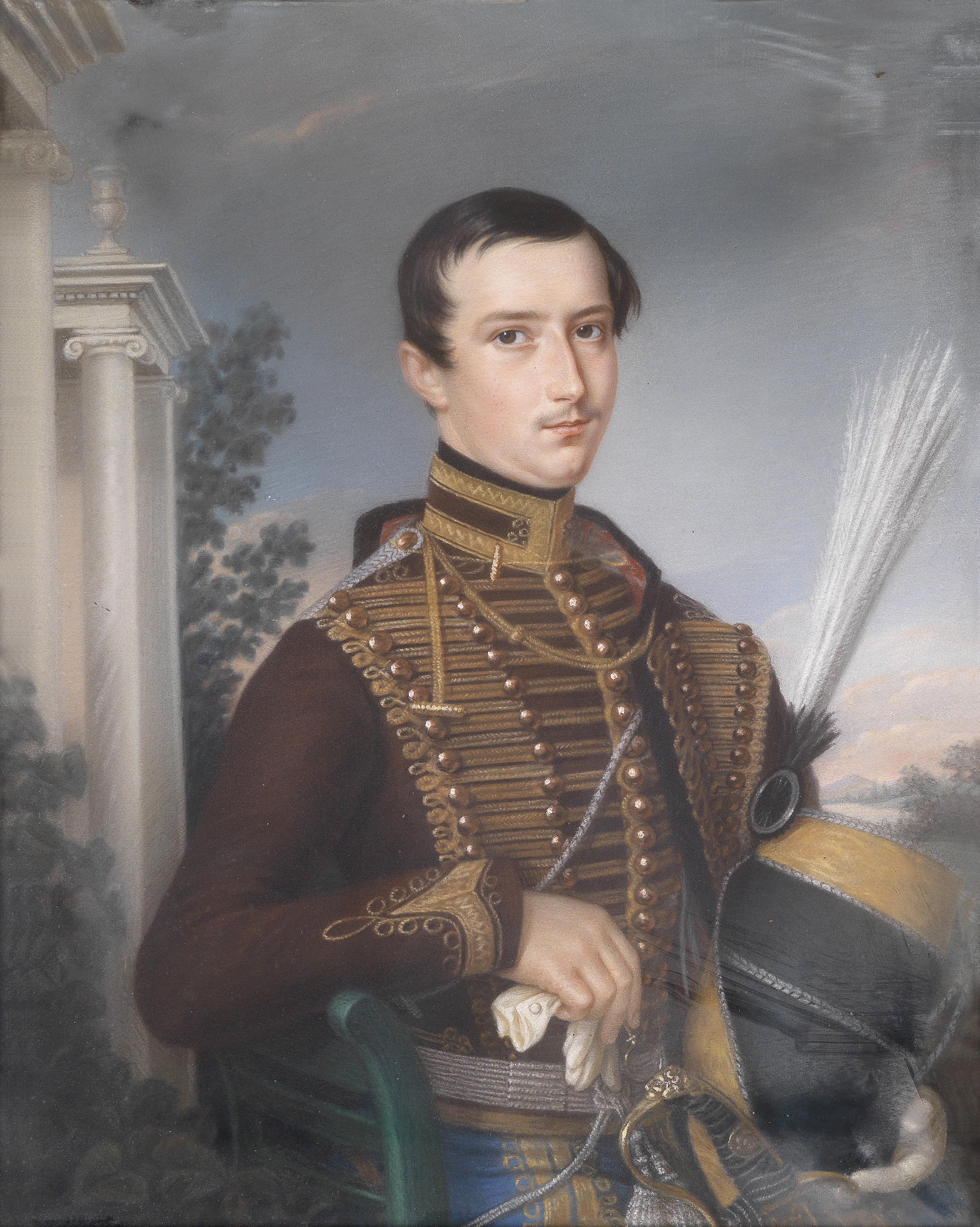 Bildnis des Freiherrn Otto von Scholley (1823–1907) in Uniform